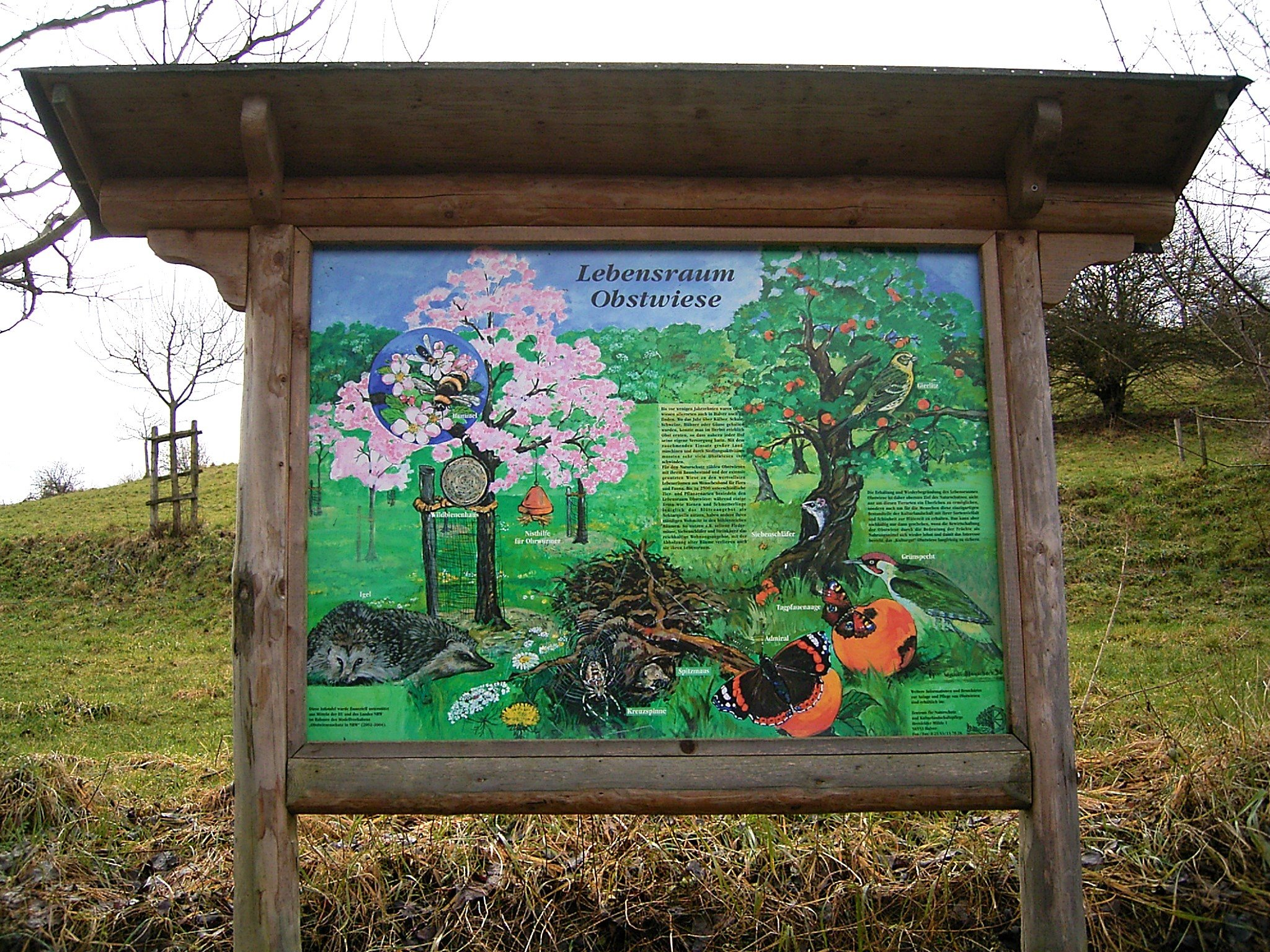 Halver - Heesfeld